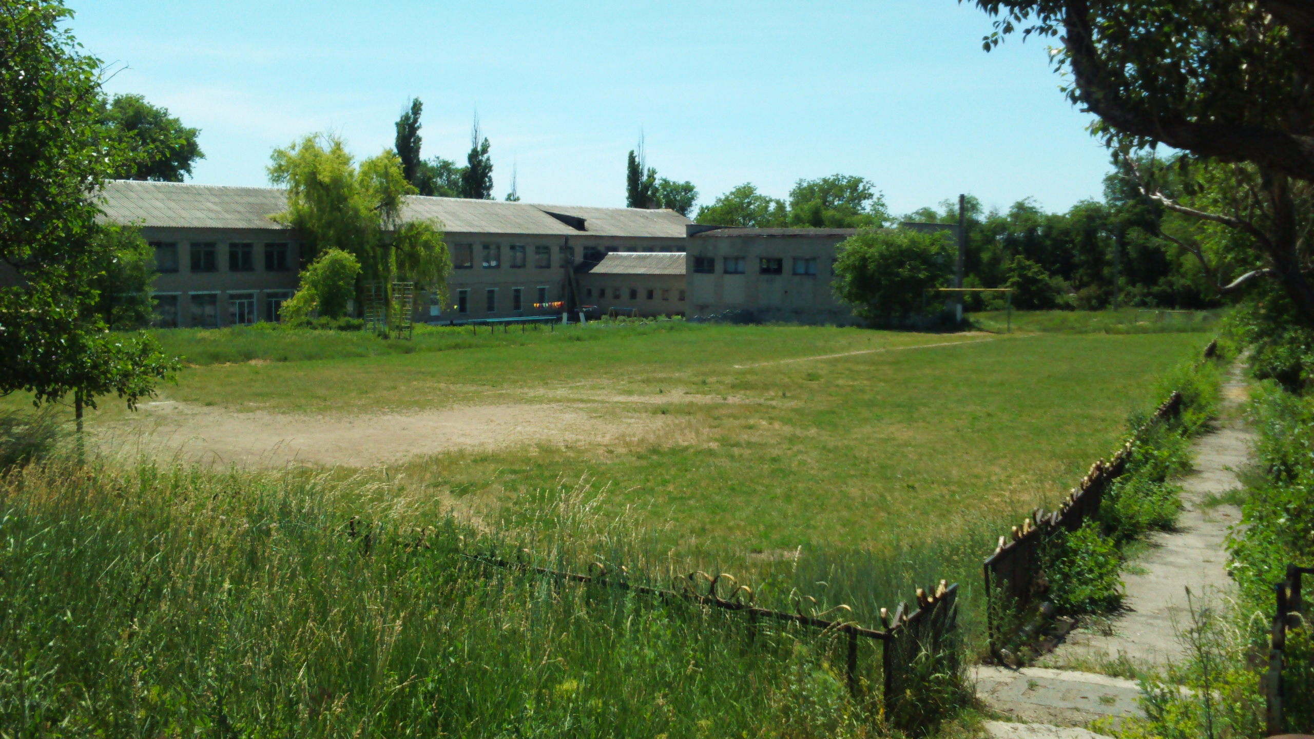 Ві́рівка — село в Україні, Добропільському районі Донецької області.